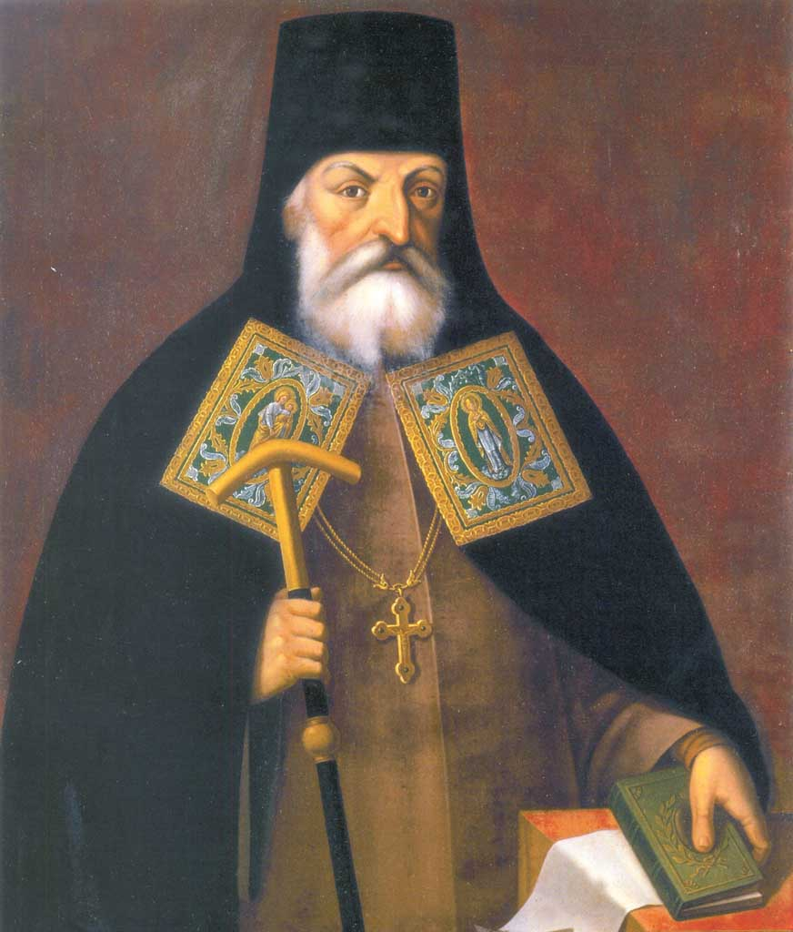 Архимандрит Иоанникий Голятовский.